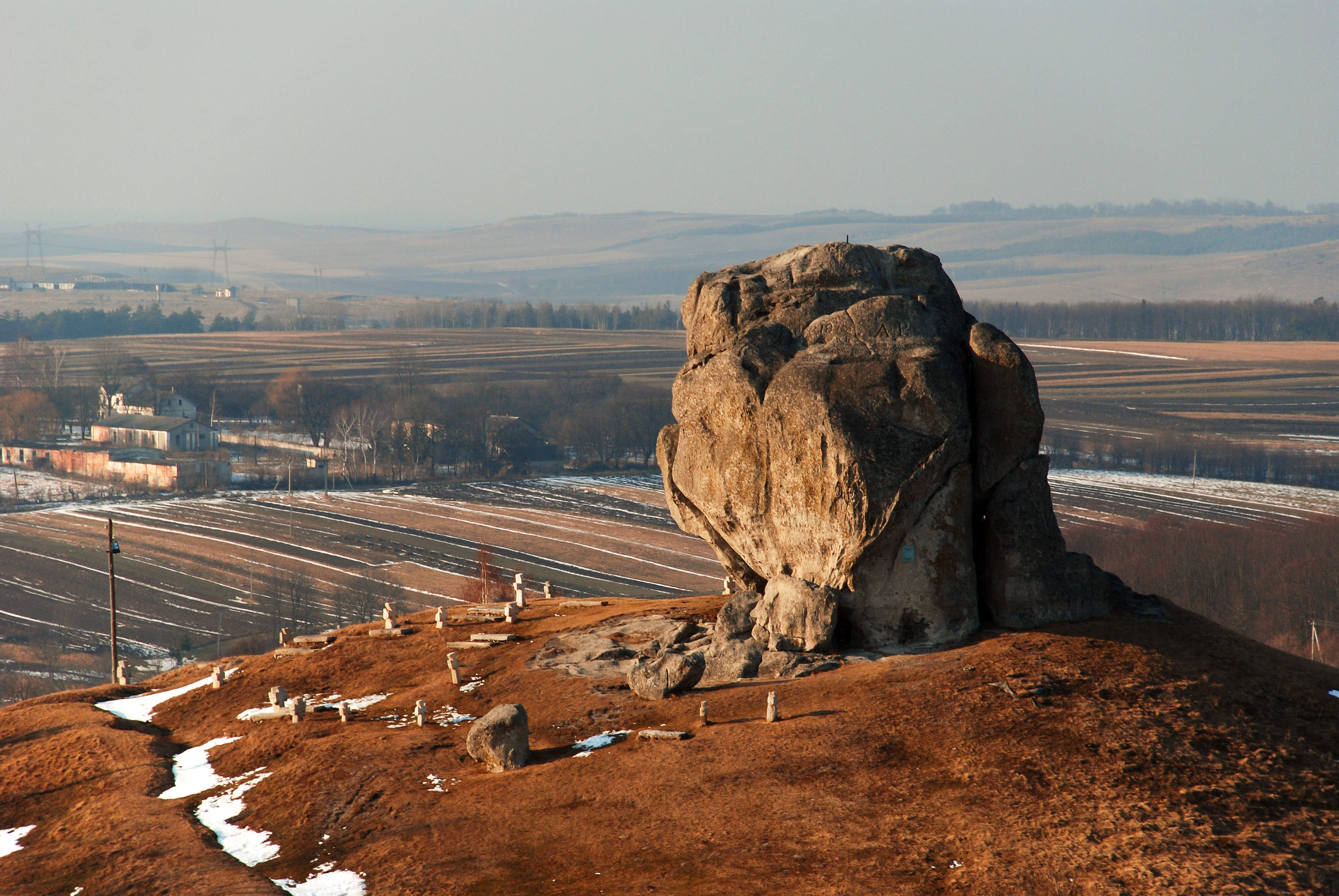 Ерозійний останець морських рифів Товтрів або Медоборів Сарматського віку в околицях с. Підкамінь, Бродівський р-н, смт Підкамінь